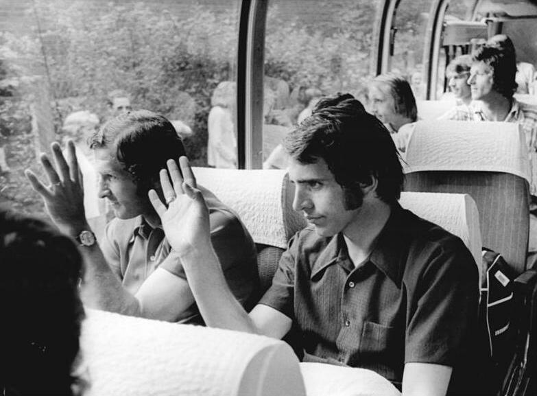 ADN-ZB-Mittelstädt-25.6.74-mo-Düsseldorf: Fußball-WM- Aus dem Mannschaftsbus erwidern W. Blochwitz und J. Croy (v.l.) die Grüße der Bevölkerung von Ratingen.